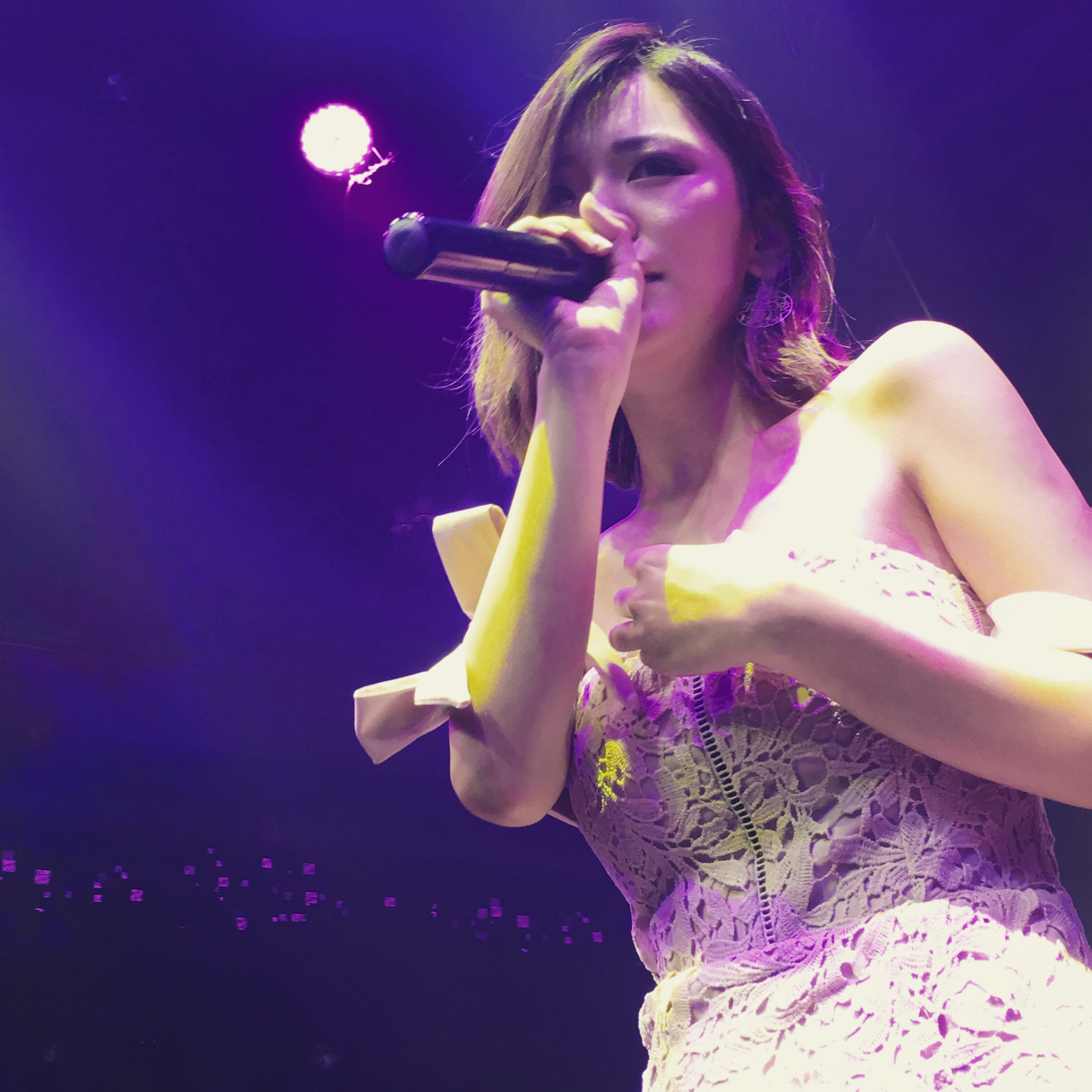 Kiko Tong Boarding photo, Apr 2018, Update Kiko Tong Wikipedia photo